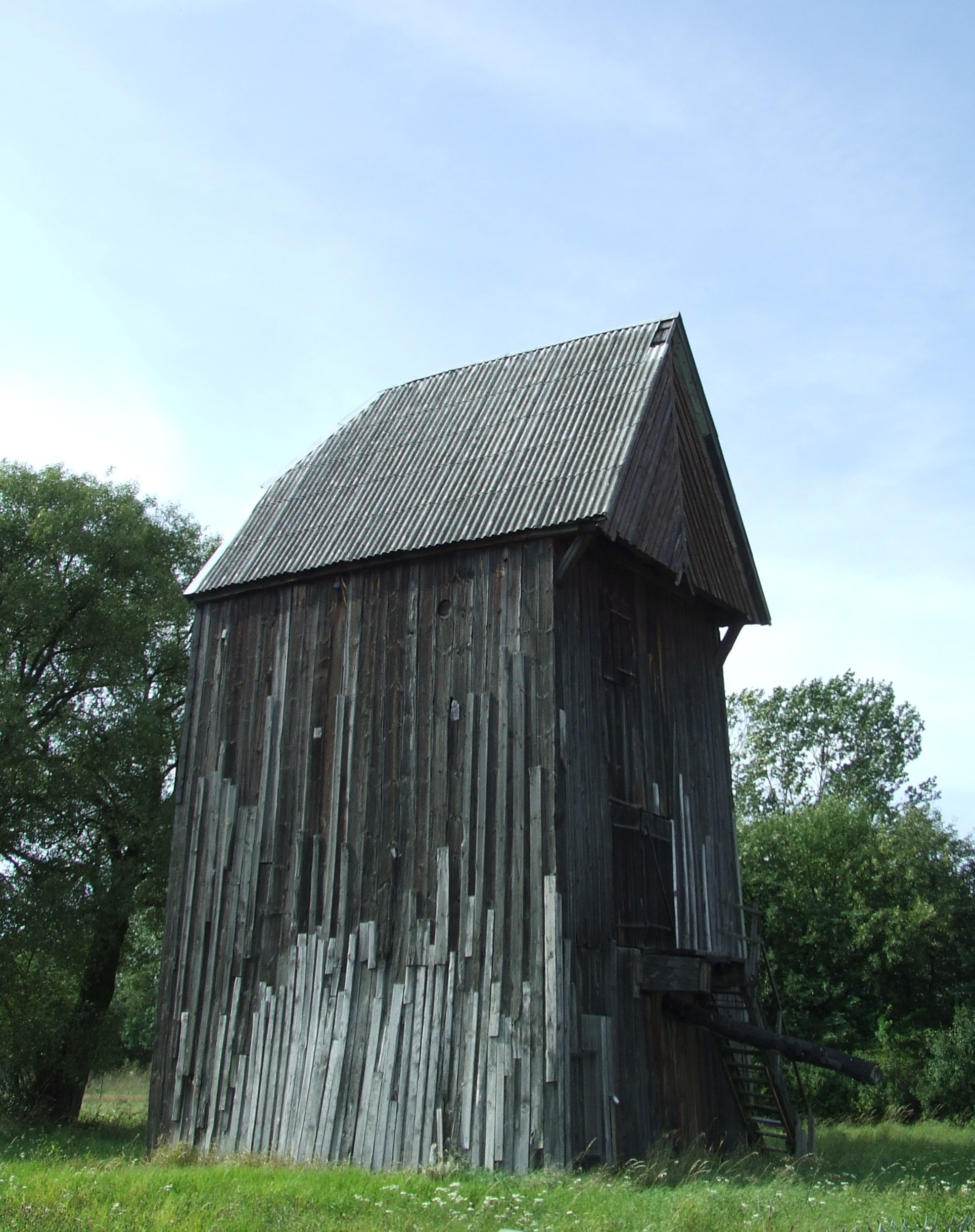 Parysów, ul. Kościuszki 53 - wiatrak koźlak, drewn. 04.1962.